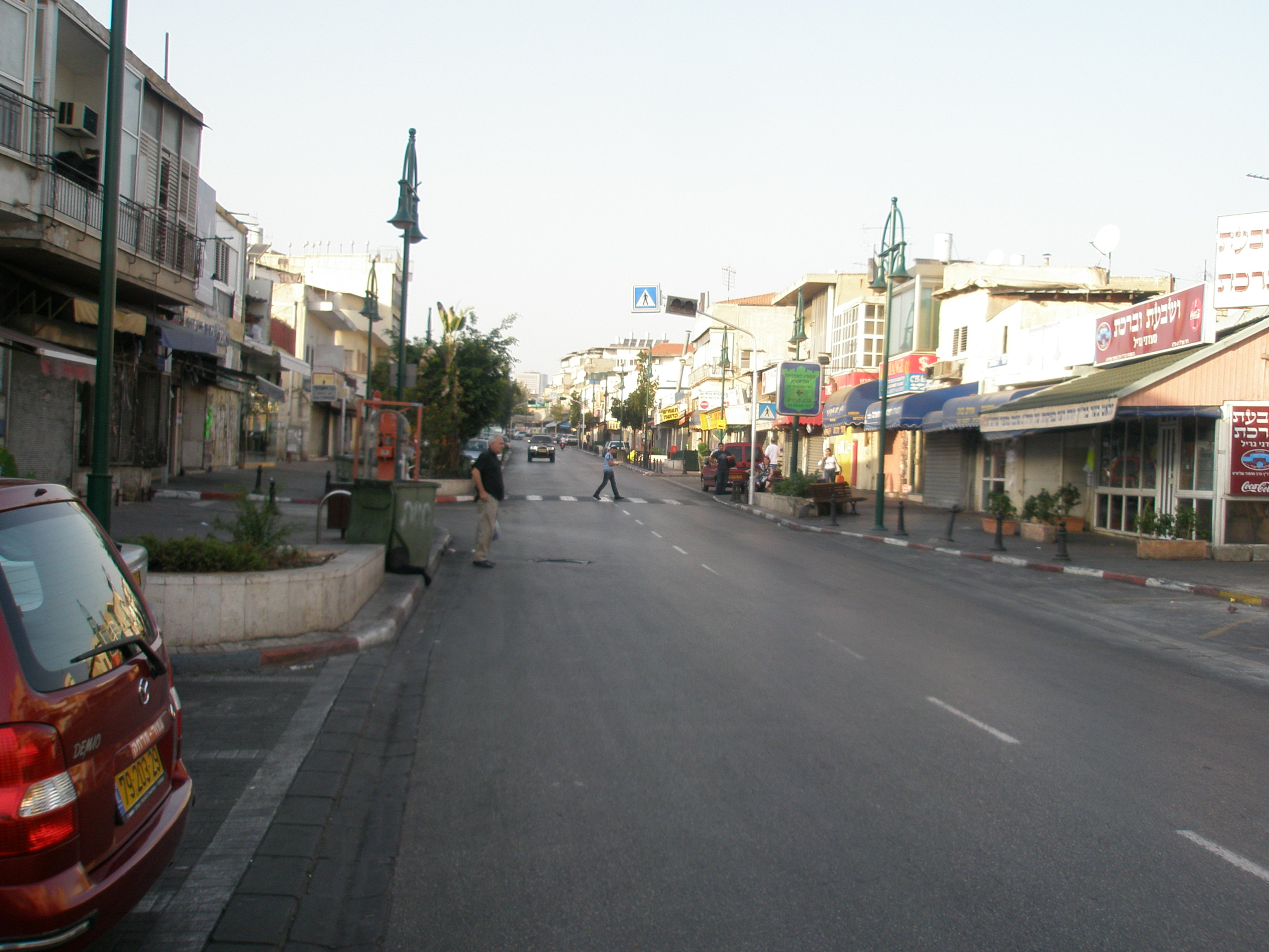 Etzel street in Shkunat hatikva, Tel Aviv